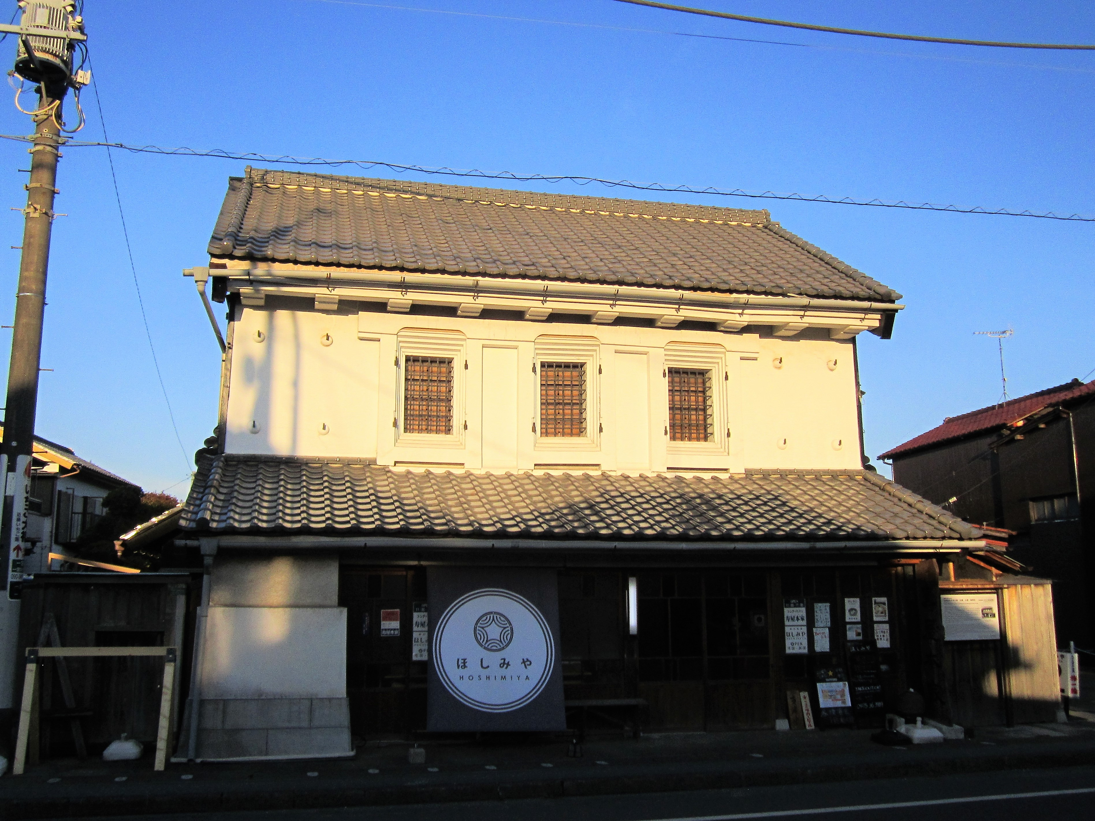 旧斎藤家住宅店蔵（一宮町一宮字通町） Canon PowerShot A2200